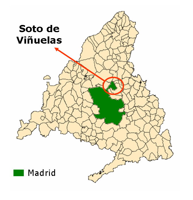 Mapa del Soto de Viñuelas. Madrid, Spain